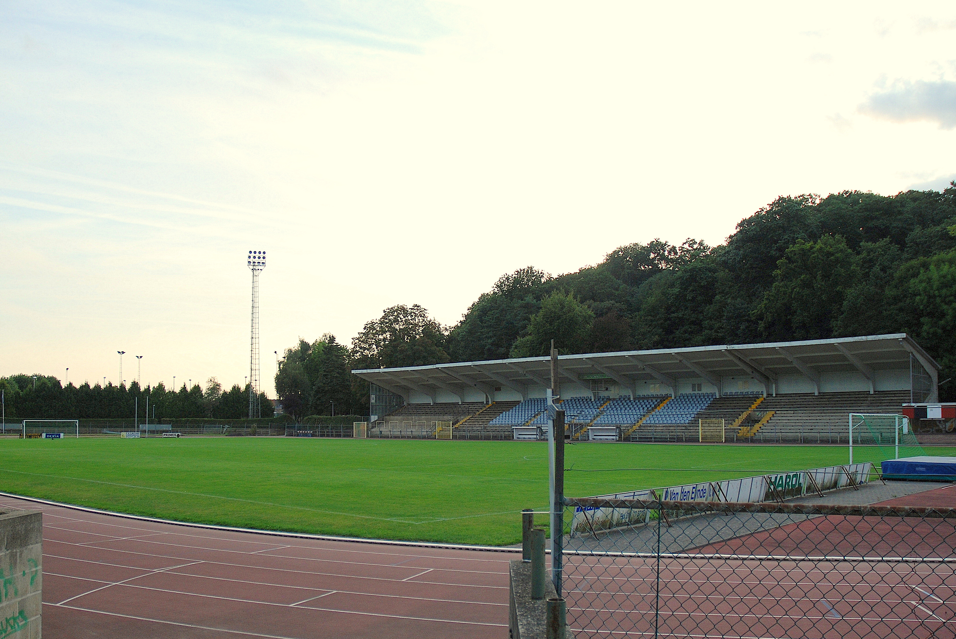 Voetbalveld van KFC Diest, te Diest, België